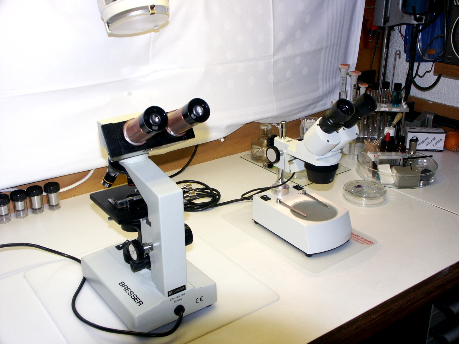 Das ganze sieht heute November 2007 - schon anders aus.